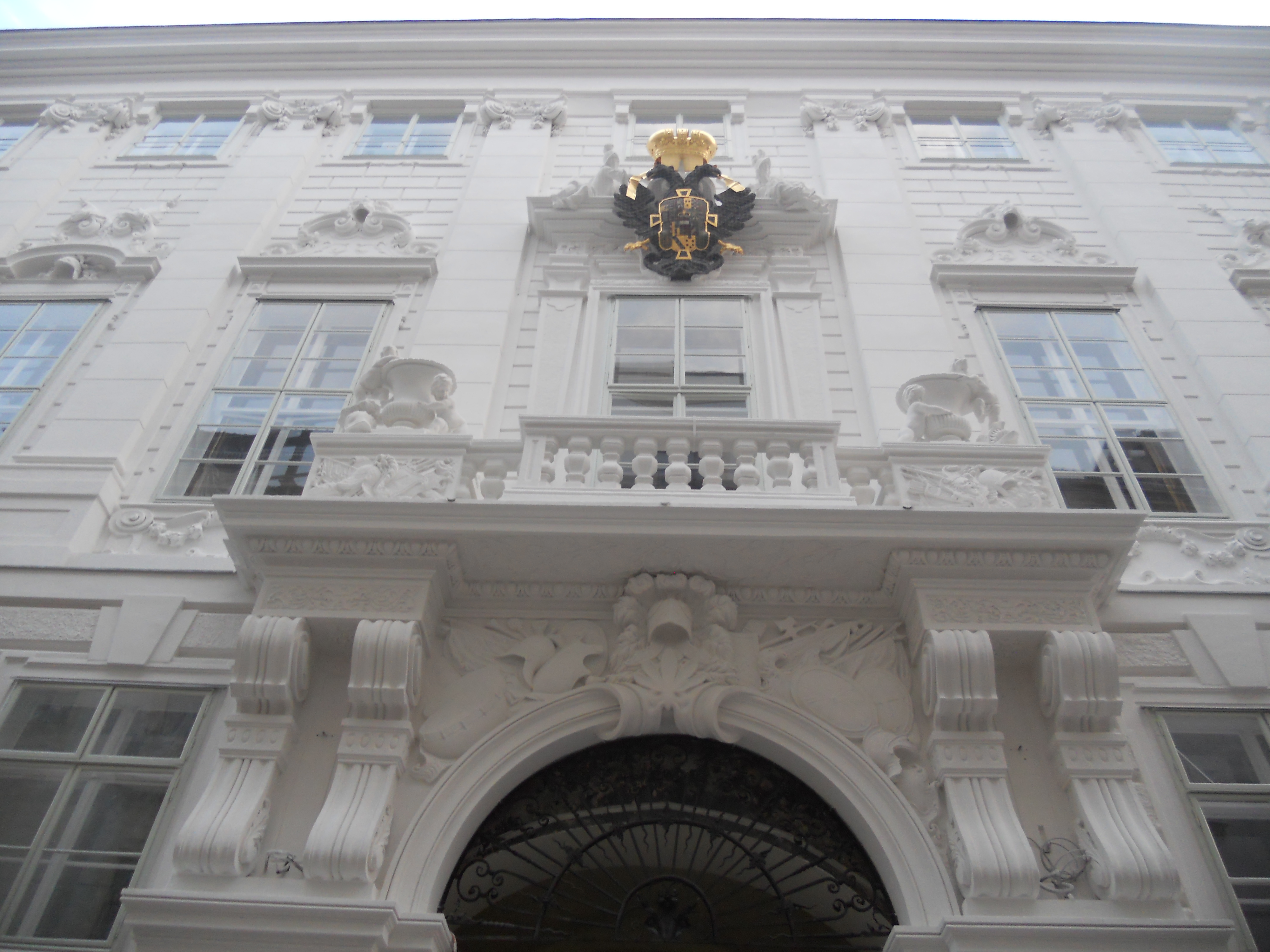 Ehem. Stadtpalais des Prinzen Eugen, BM für Finanzen, im bereits renovierten Zustand September 2012, mittleres Portal